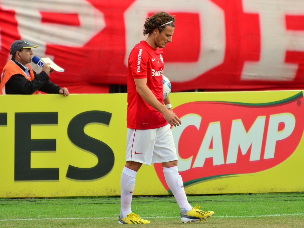 Diego Forlán em ação pelo Inter em 2013